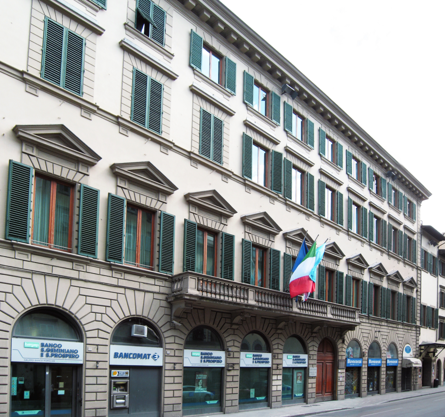 Presidenza della giunta regionale of Tuscany